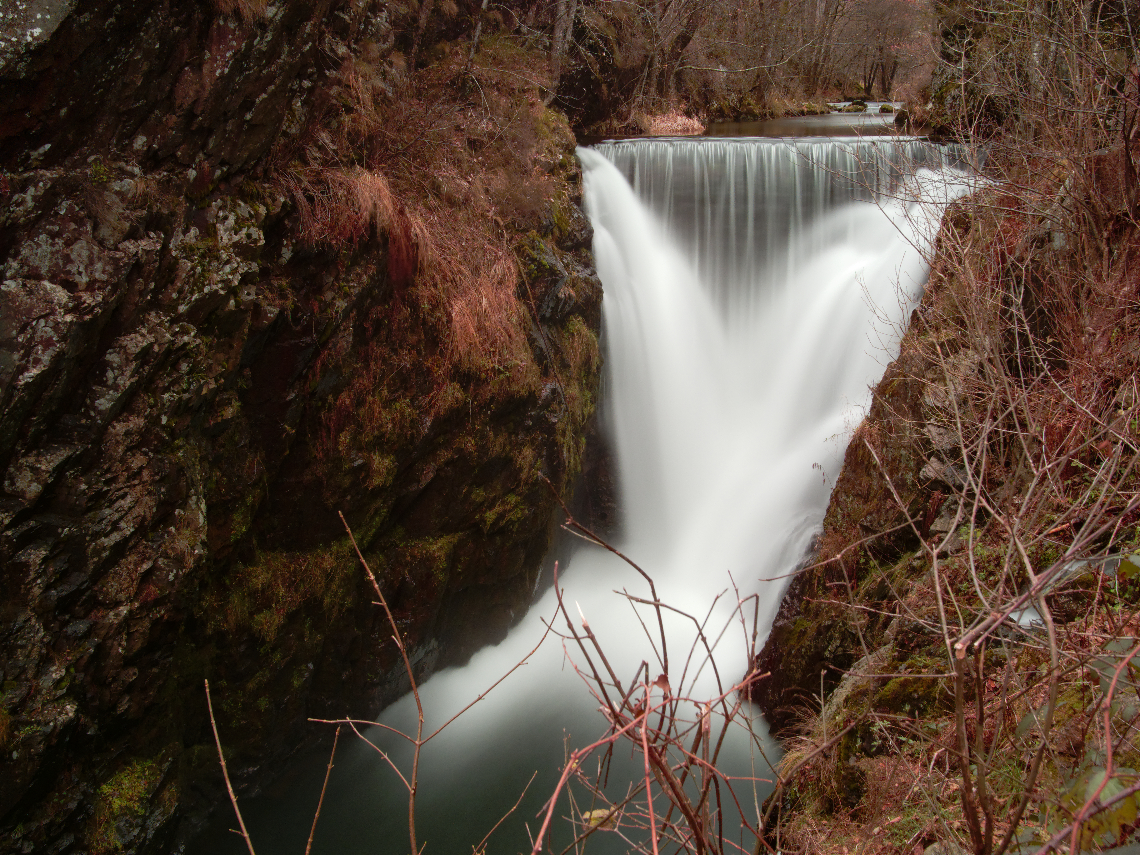 Saut de l'Ognon. Photo réalisée avec un filtre ND16.